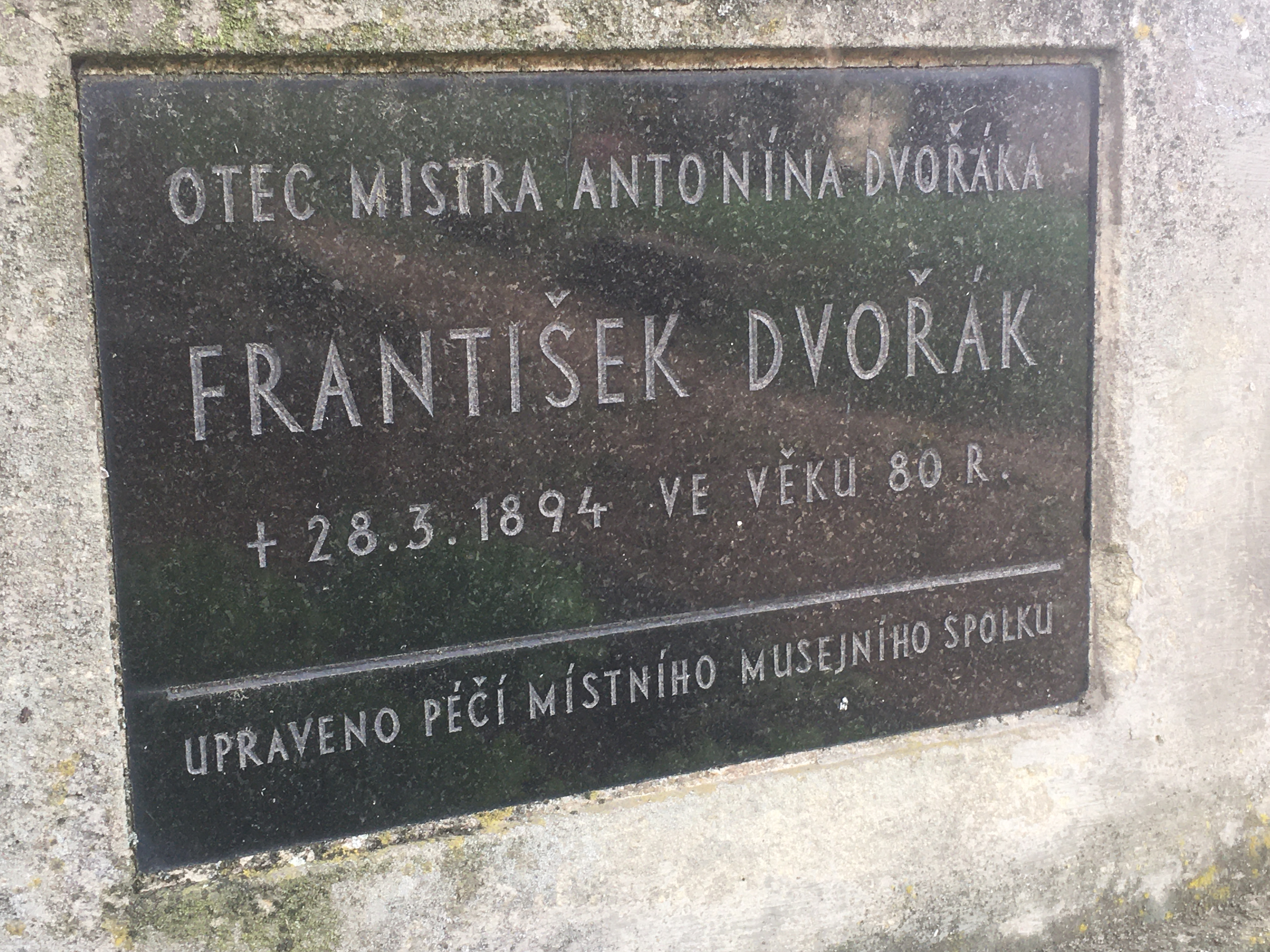 Hřbitov u kostela sv. Jiří ve Velvarech